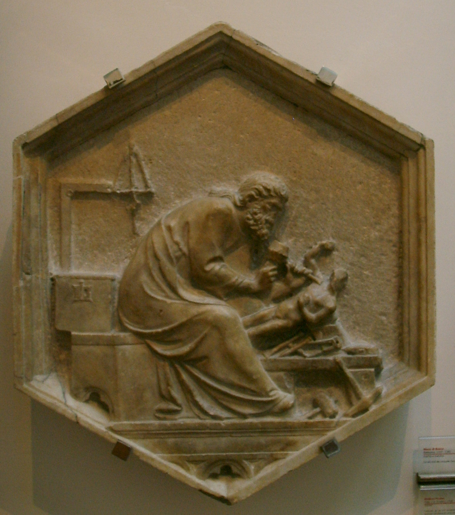 Formella 17, fidia o la scultura, andrea pisano, 1334-1336